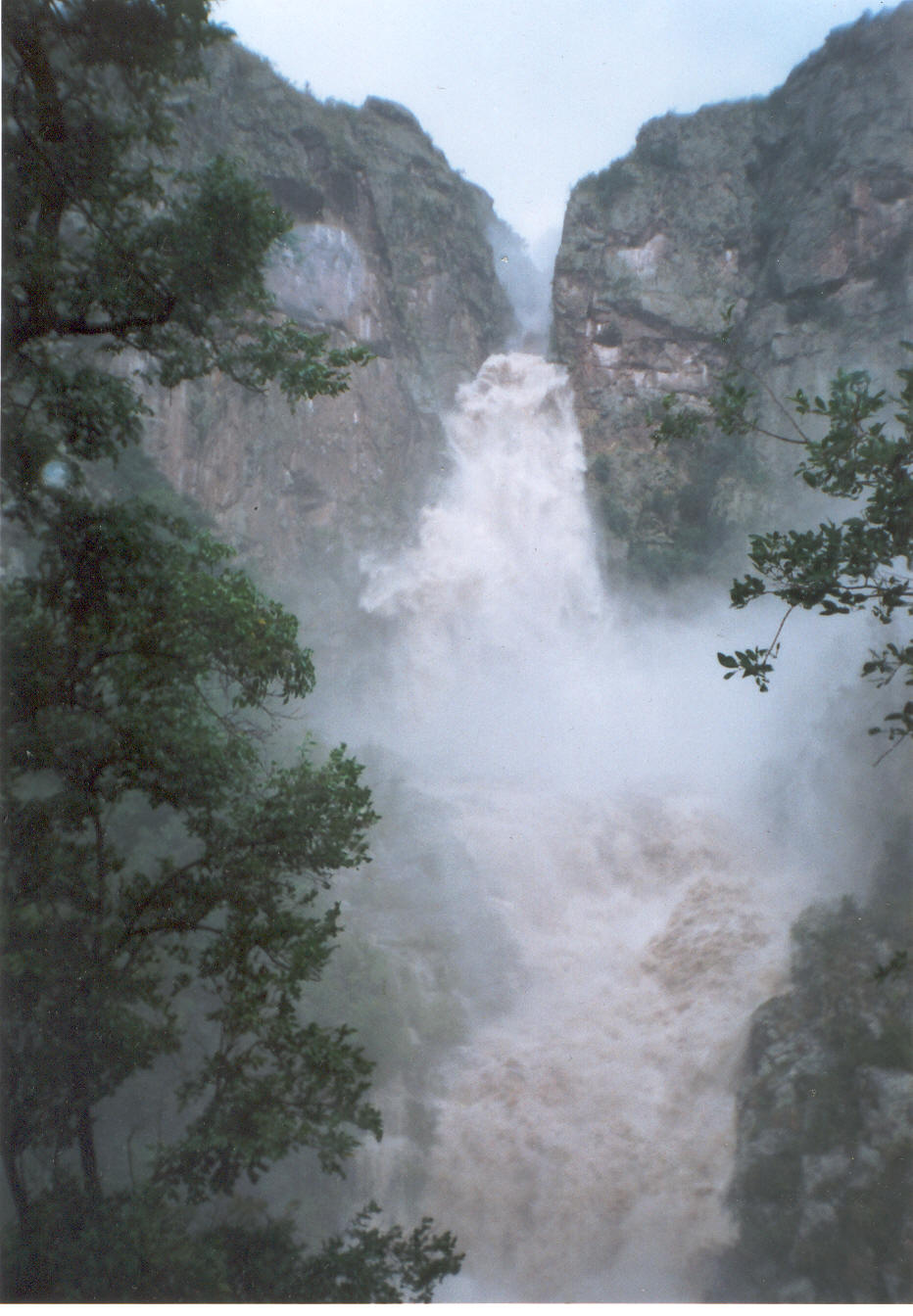 Cascada Los Chorrillos en Tanti - Córdoba - Argentina , muy crecida